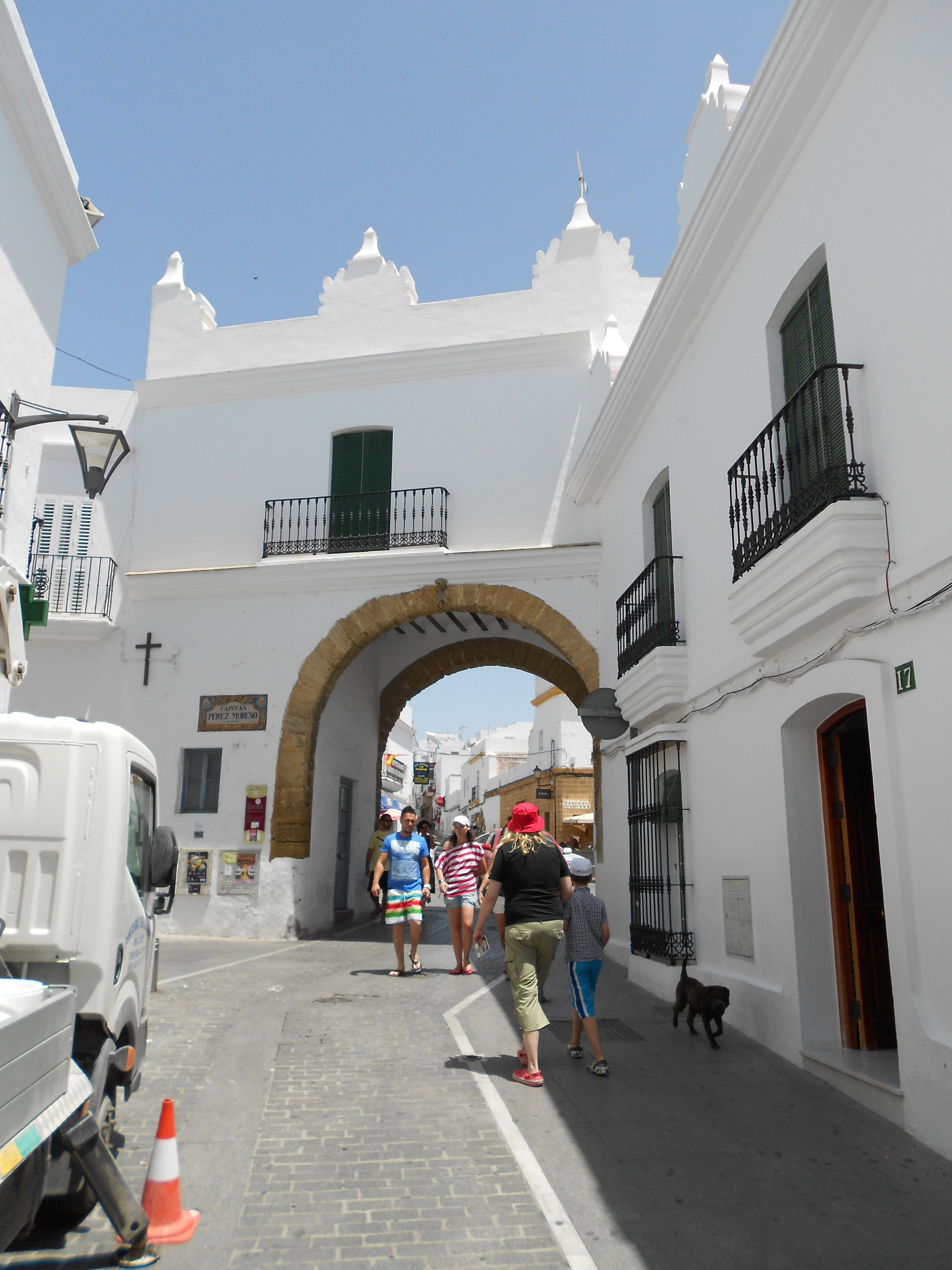 Das Stadttor von Conil de la Frontera, Nordseite